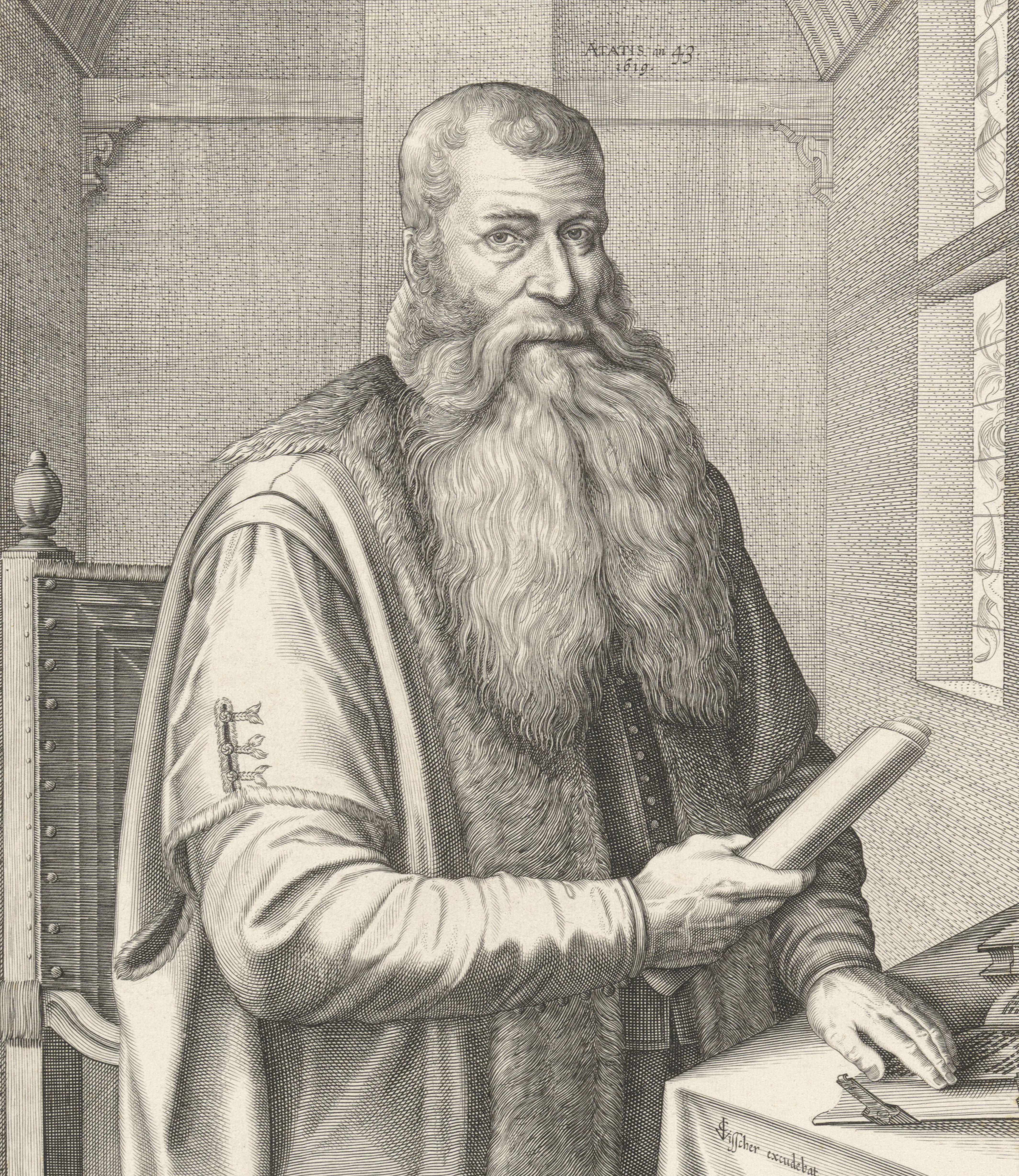 Johann Bogermann (1576-1637)